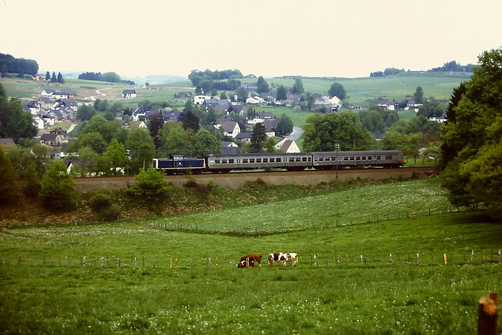 Diesellokomotive 212 312-3 mit Personenzug N6367 bei der Ausfahrt aus Marienheide Richtung Meinerzhagen. Im Hintergrund die Brucher Straße in Marienheide.